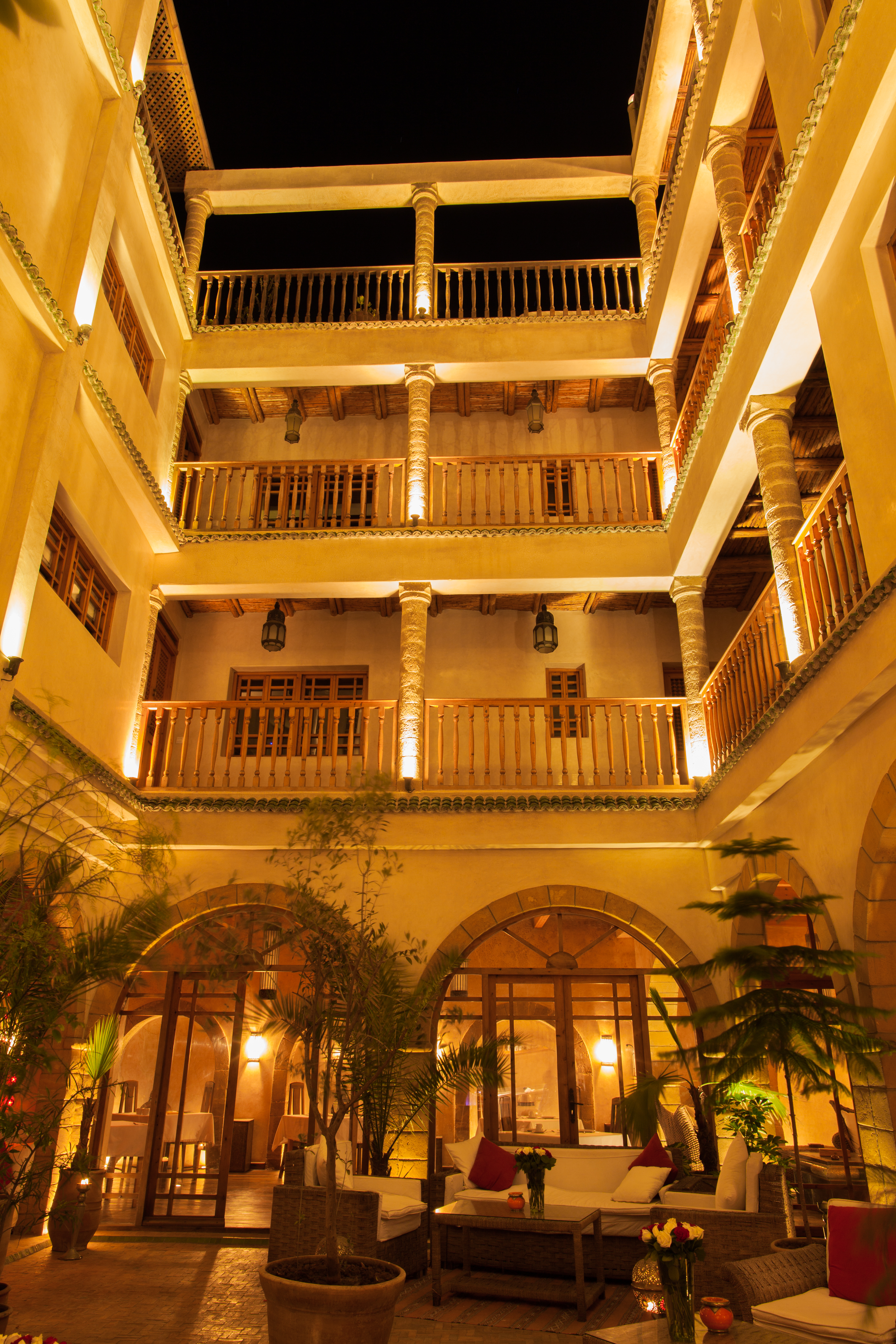 This traditional, 18th century Moroccan residence was once home to the Caid d'Essaouira and his family. Located in the Medina of Essaouira on rue Chbanate. Cette demeure traditionnelle marocaine du 18éme siècle, est l’ancienne propriété du Caïd d’Essaouira. Dans la Médina d’Essaouira, et plus précisément dans la rue Chbanate, le riad est situé à proximité de Bab Marrakech.